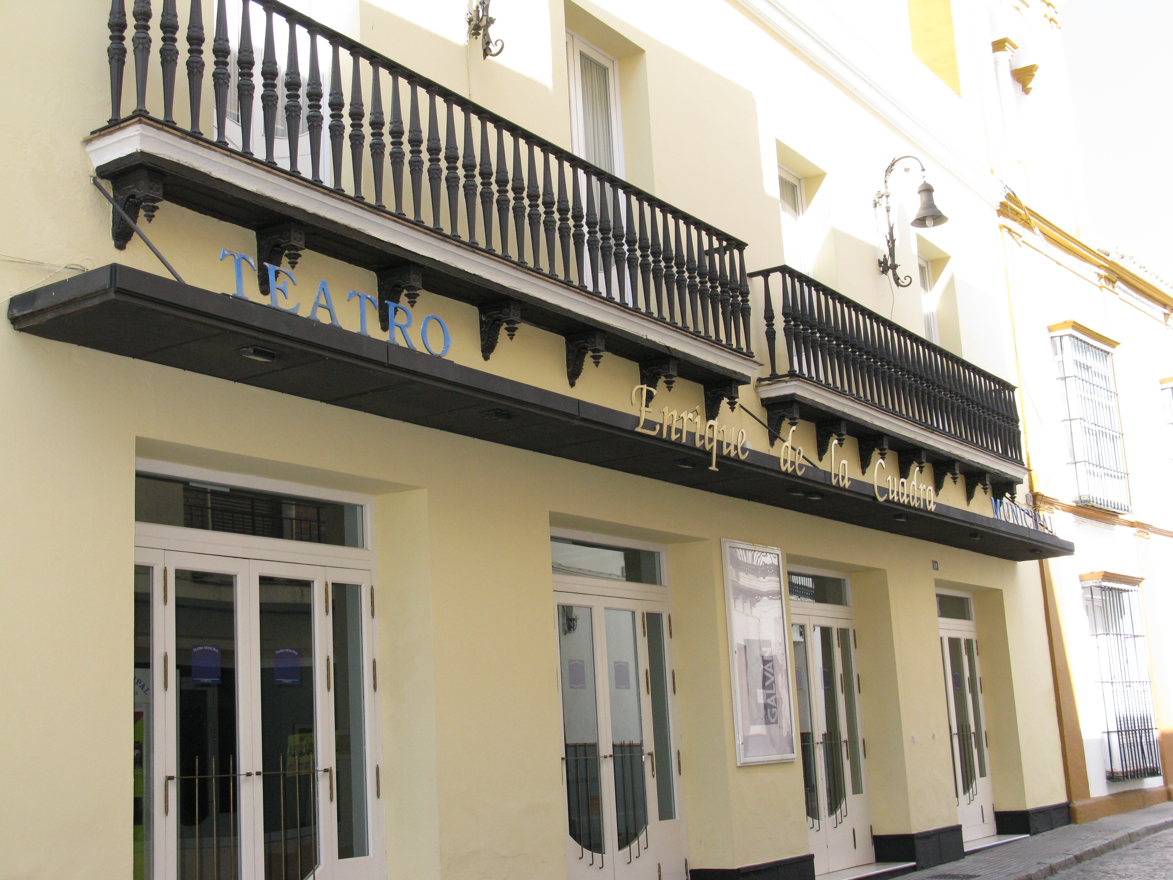 Portada del Teatro Enrique de la Cuadra, en Utrera (Sevilla), España.